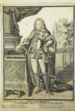 Felipe V de España, grabado por Juan Bautista Ravanals